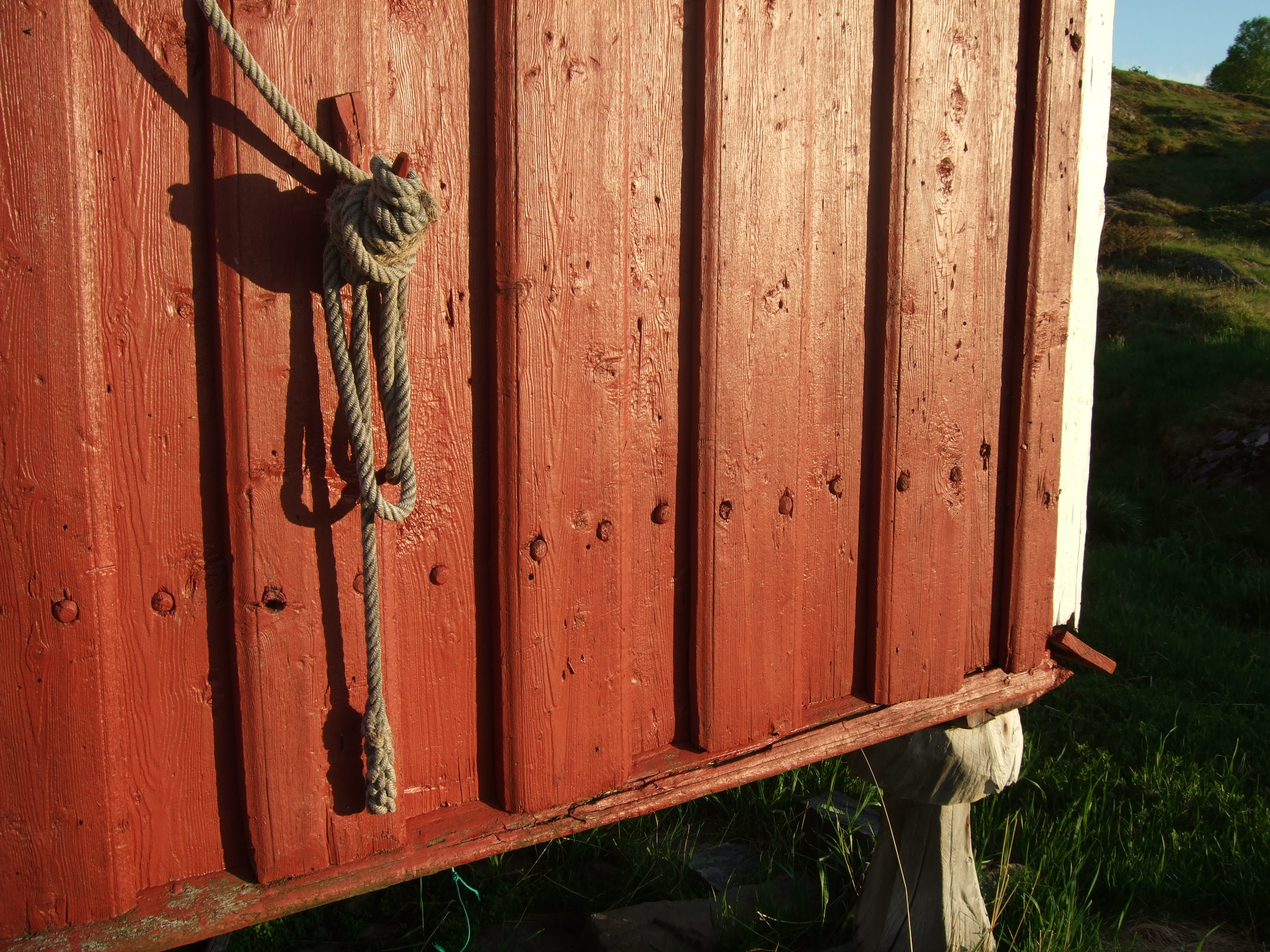 Detaljbilde som viser hvordan den over 200 år gamle bordkledningen på stabburet på Løvøy gamle handelssted er festet med de opprinnelige trenaglene. Tauet som vises i venstre hjørne er til stabbursklokka. Pillaren stabburet står på (nederst til høyre) har en spesiell profil for å hinmdre smådyr i å klatre opp.